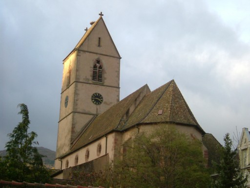 Wattwiller, église St Jean-Baptiste vue de trois-quarts